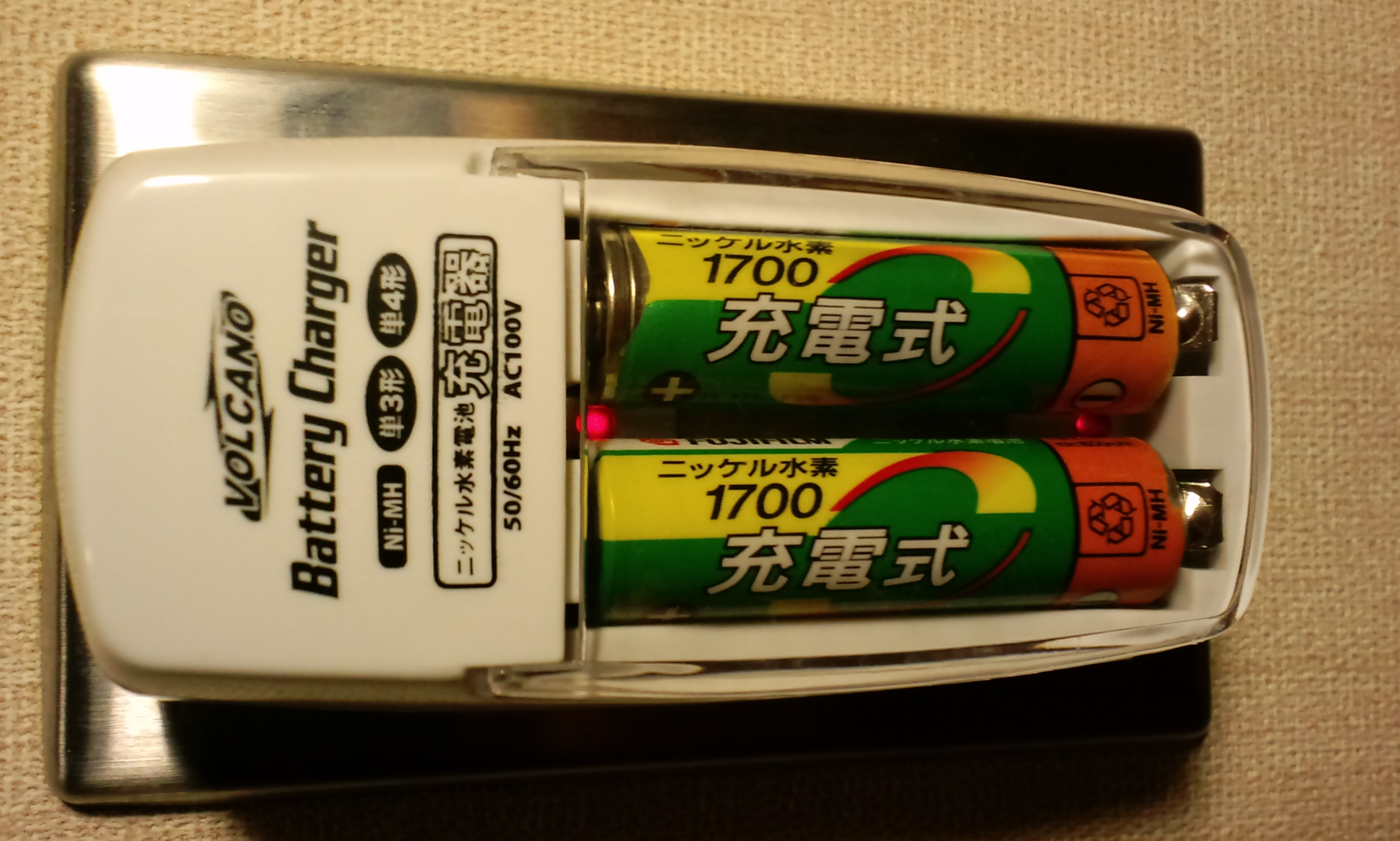 自宅で撮影。充電器は武田コーポレーションの高性能タイプ、電池は富士フイルムのものです。